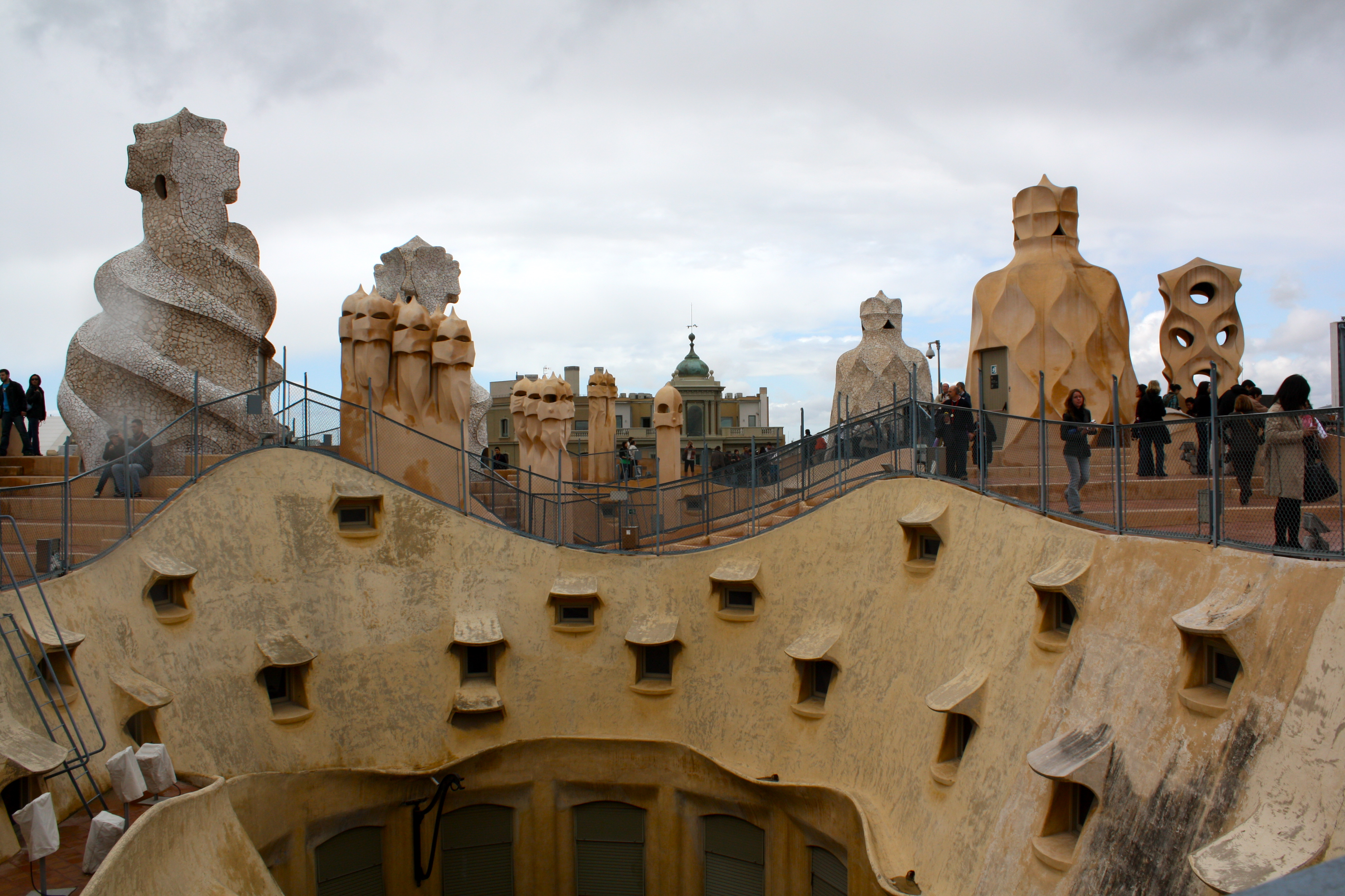 Barcelona Part Deux - 42